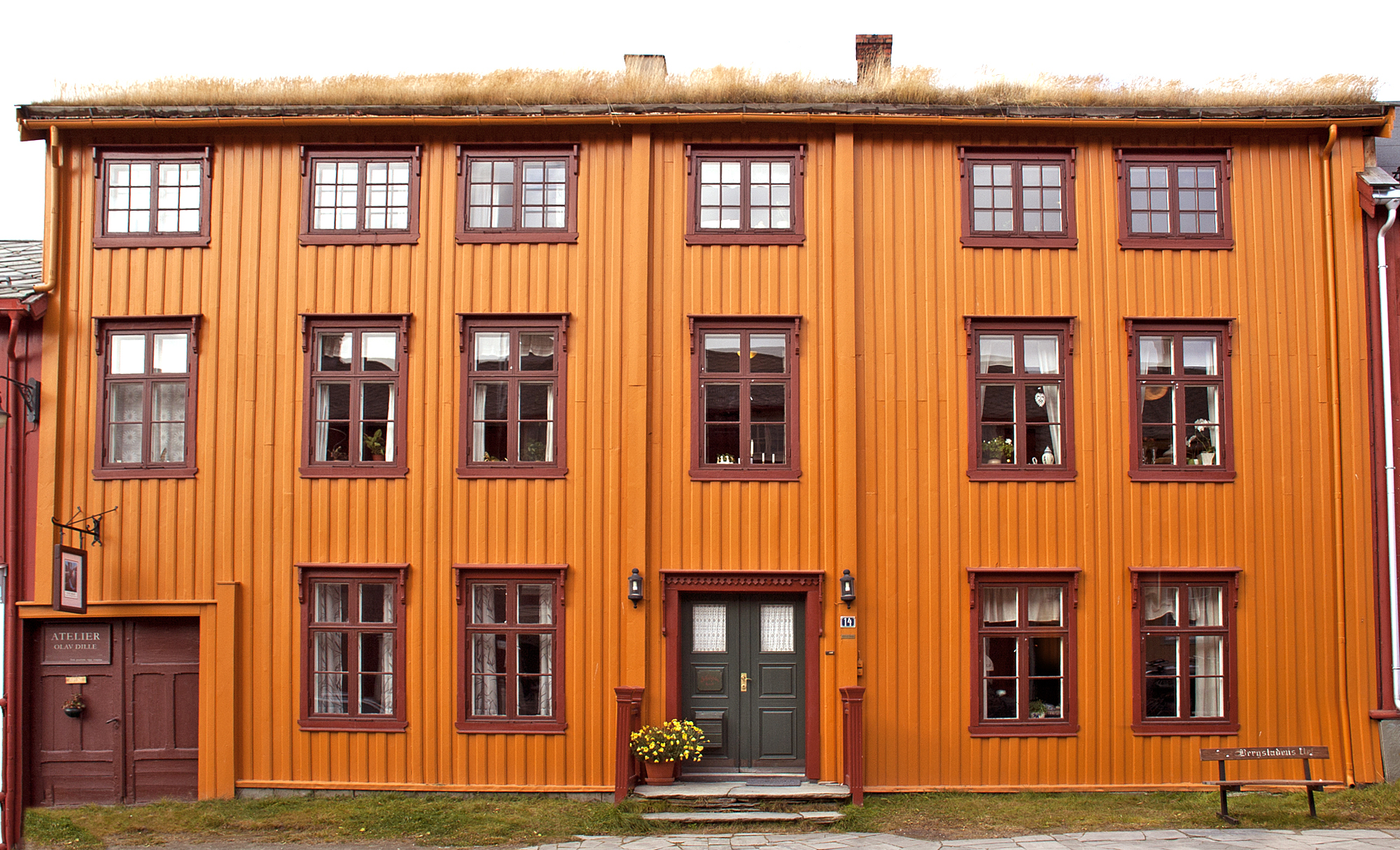 Gården er oppkalt etter Fru Pernille Bekholdt, som kjøpte gården i 1900, men allerede i 1771 stod det en gård på denne plassen.